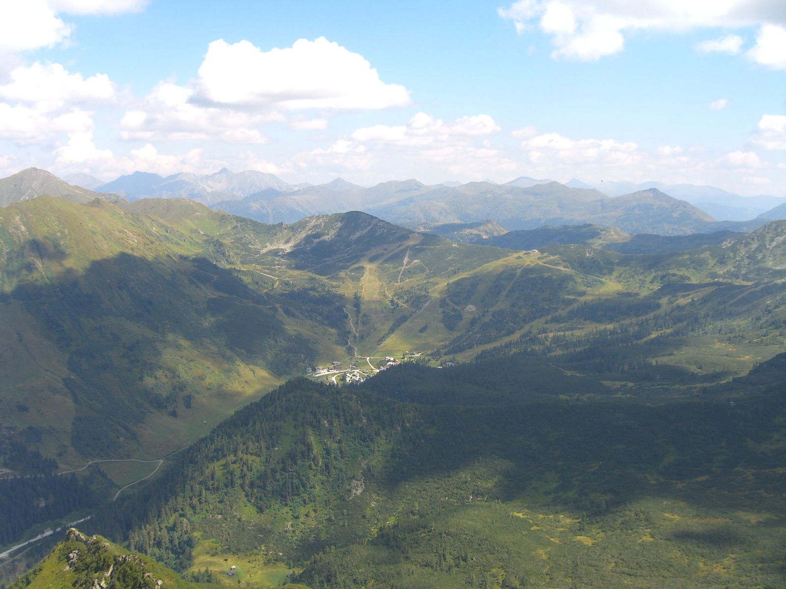 Blick nach E in den Plannerkessel